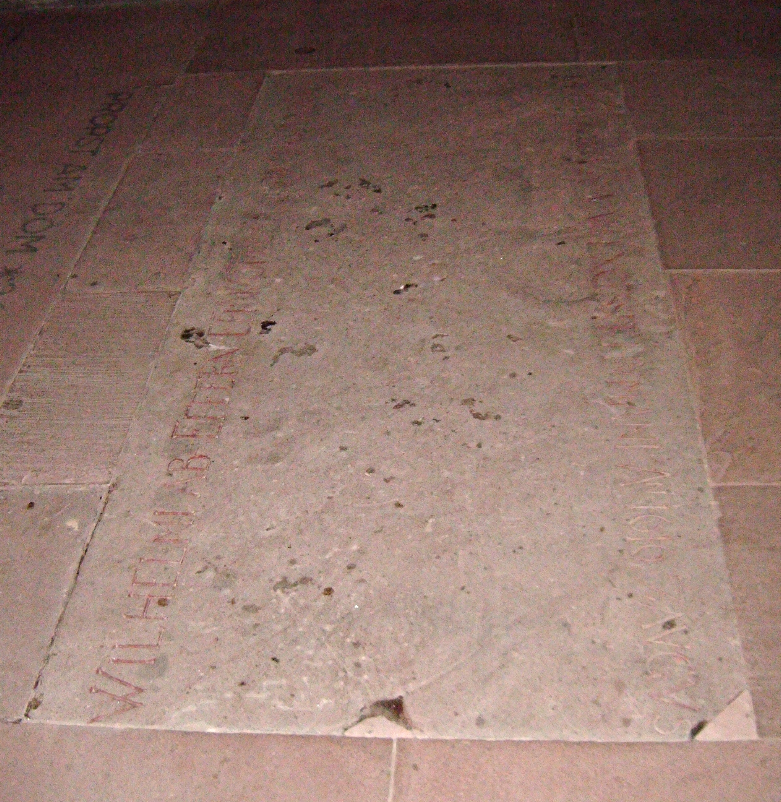 Grabplatte des Bischofs Wilhelm von Efferen (1563-1616), Dom zu Worms, nördliches Querschiff